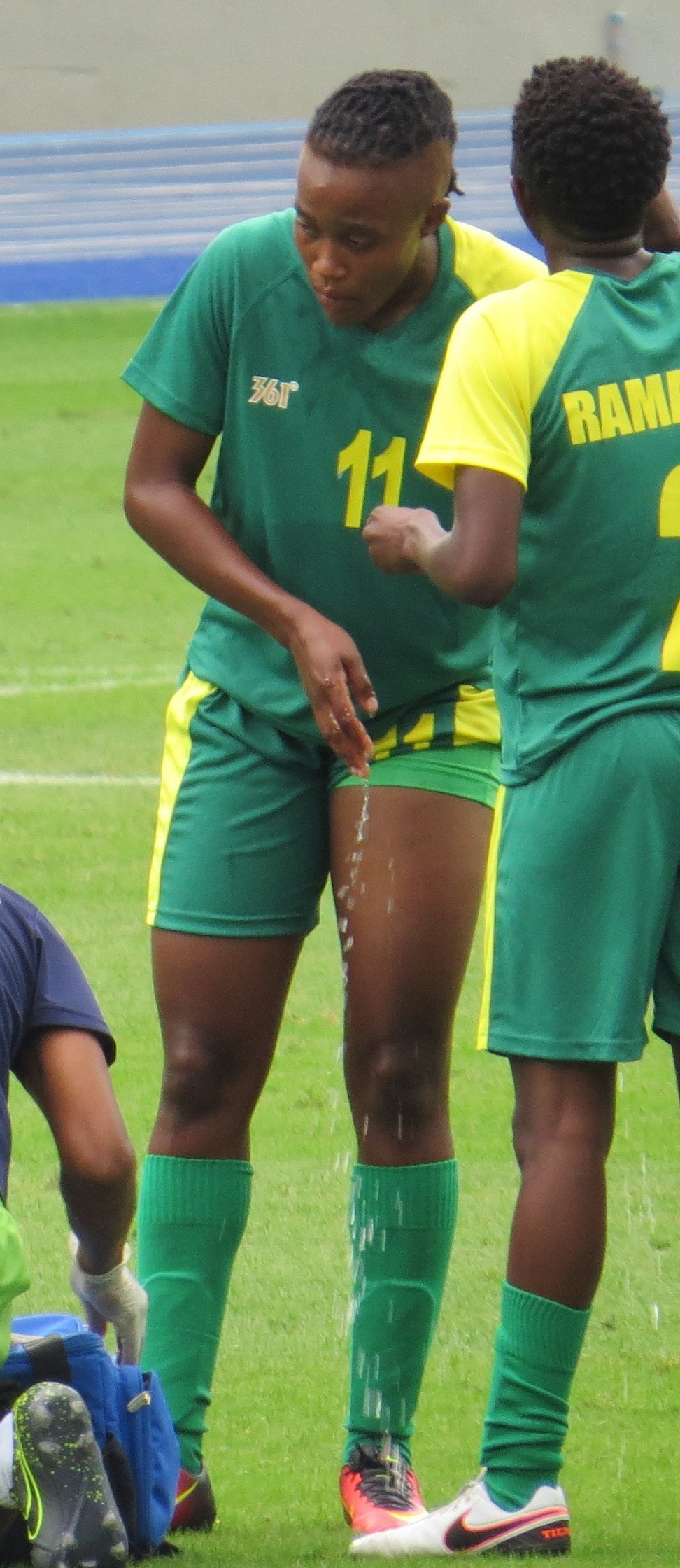 Futebol feminino Suécia 1 x0 Africa do Sul 03/08/16